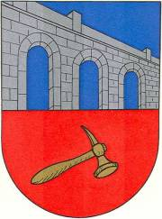 Wappen von Les Ponts-de-Martel Kanton Neuenburg Schweiz